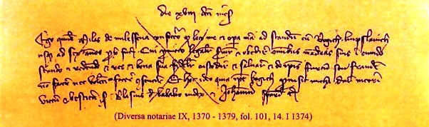 Први докмент о роду Малешевић